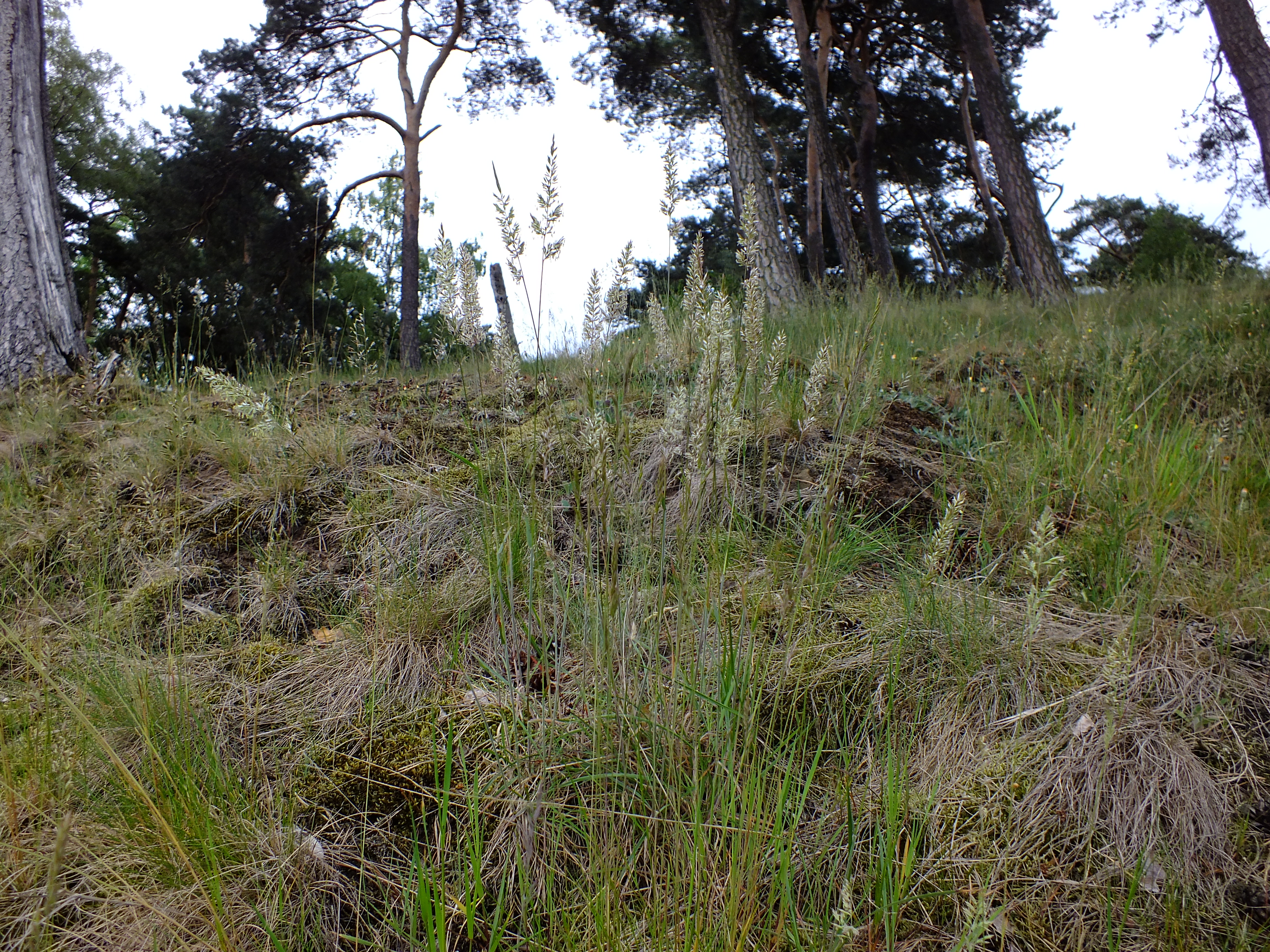 Naturschutzgebiet „Klotzberg“ (NSG BR 012) im Mai 2014, Zierliches Schillergras